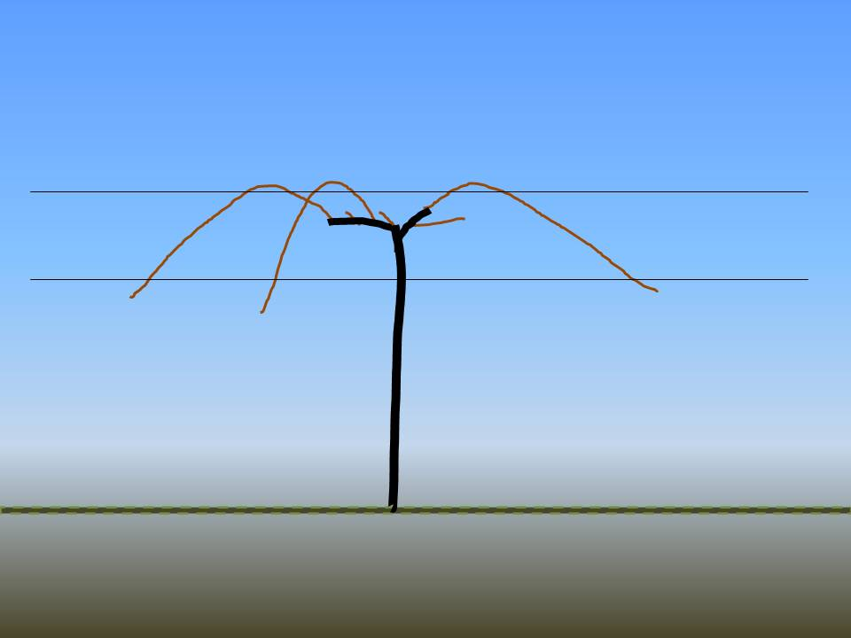 Umbrella Kniffin